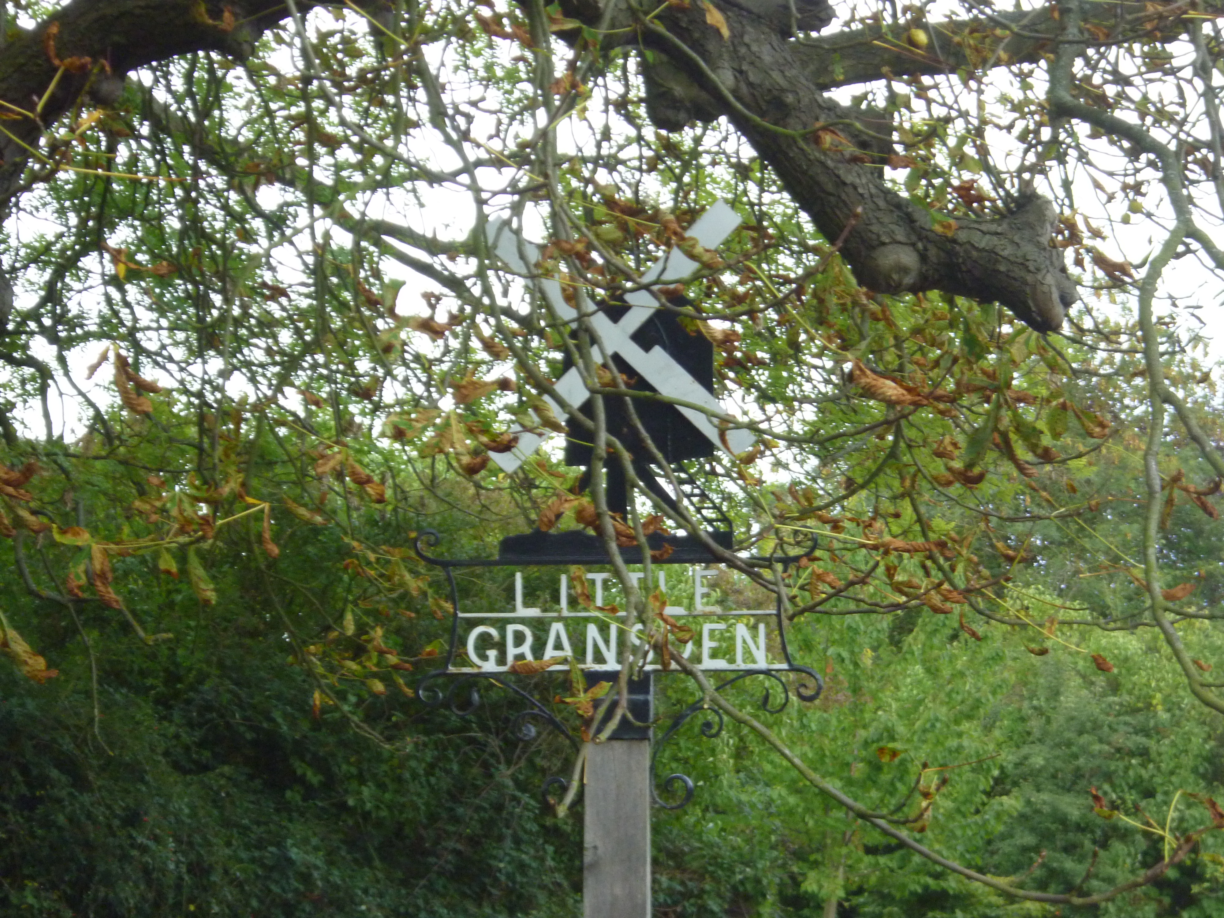 Little Gransden Village Sign